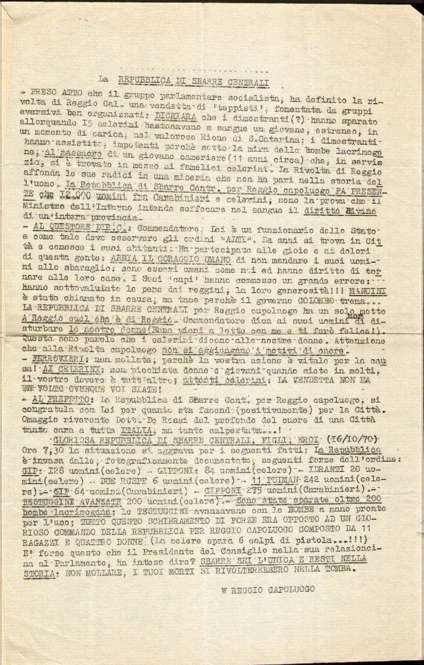 volantino, circolante durante i Fatti di Reggio del 1970, che riguarda la "Repubblica di Sbarre Centrali"